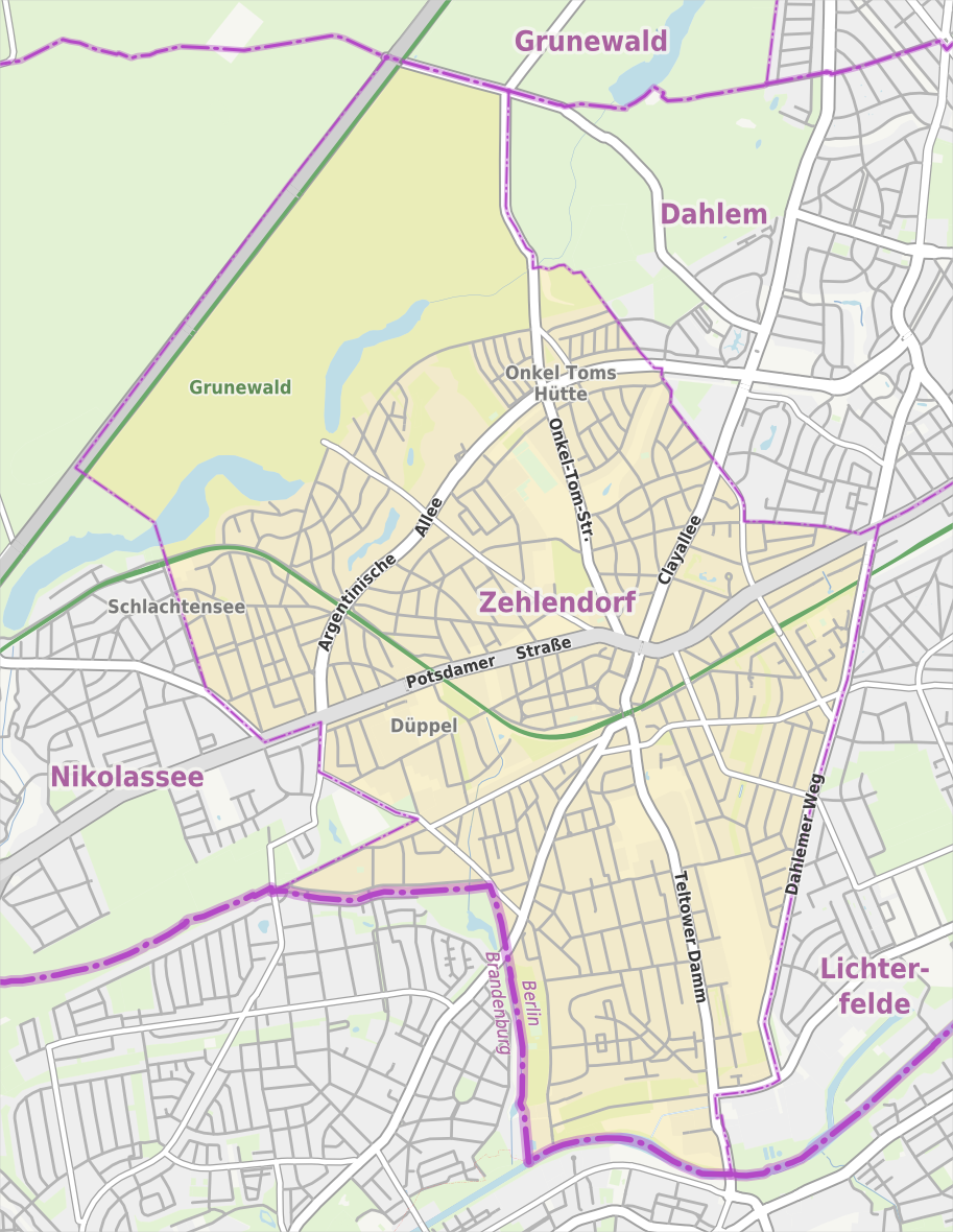 Übersichtskarte der Straßen und Ortslagen in Berlin-Zehlendorf